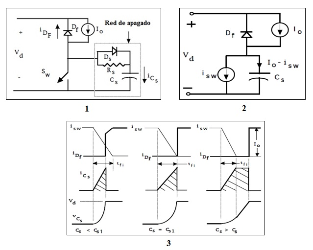 Apagado